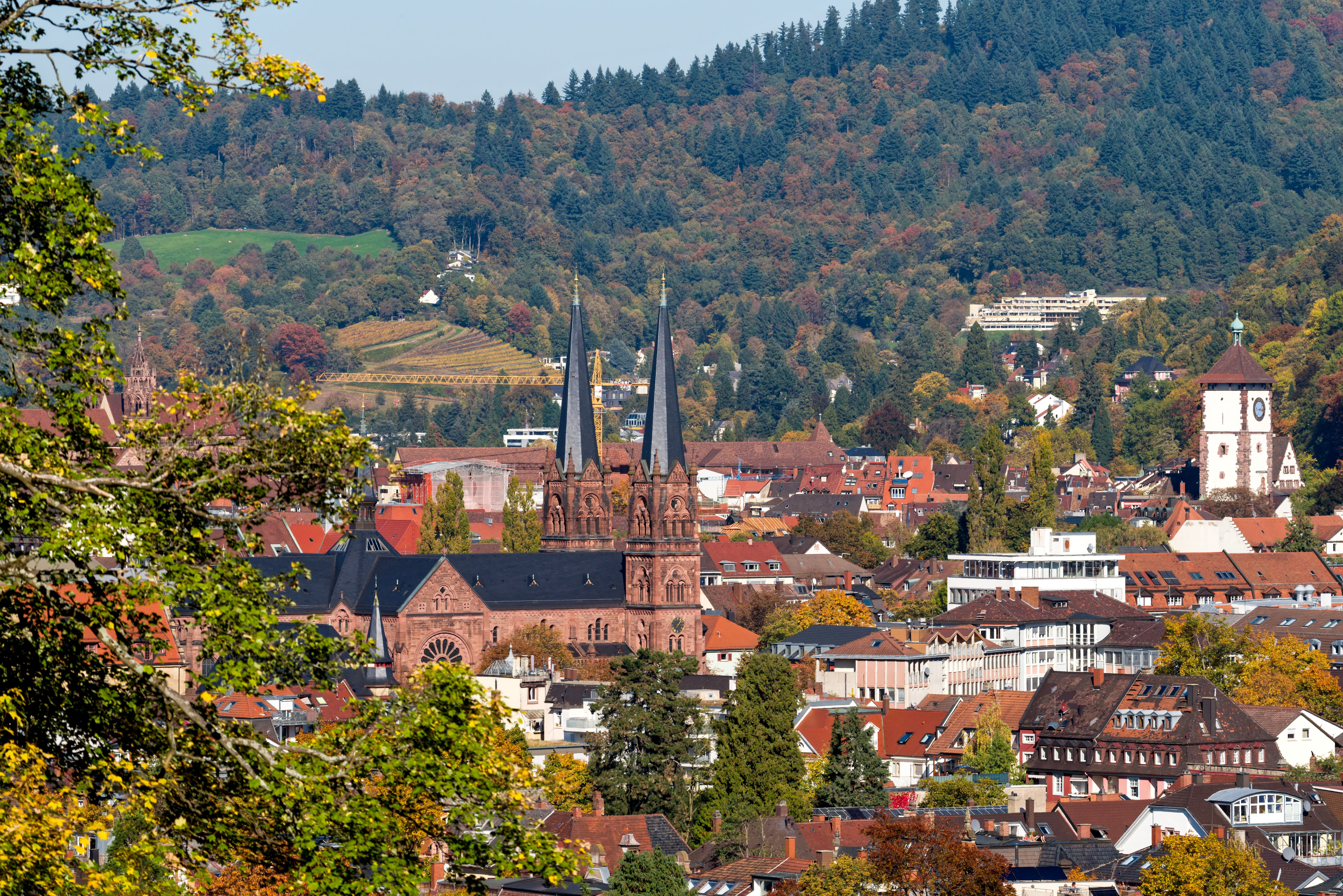 Bilder aus Niederschopfheim Brunnen